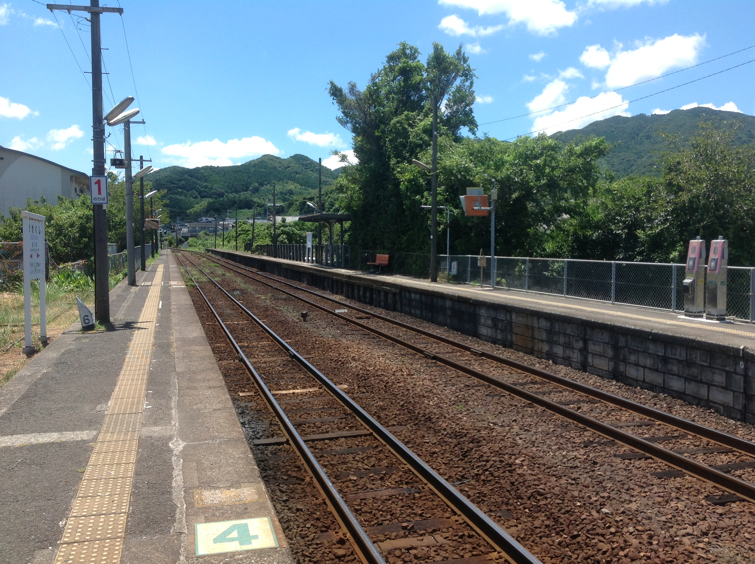 瀬々串駅ホーム